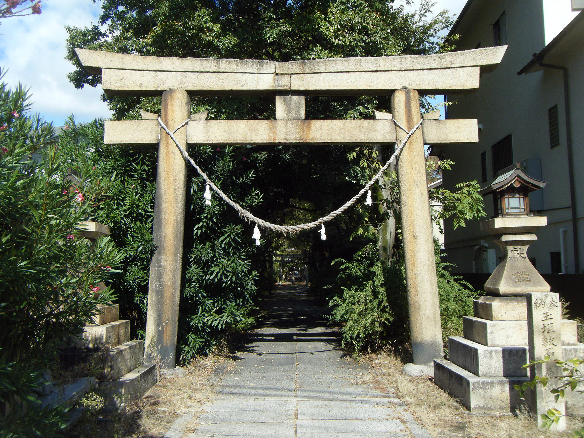 鳴尾八幡神社 南側鳥居